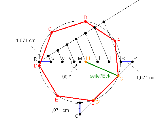 Näherungskonstruktion der Seite eines regelmäßigen 7-Ecks. Konstruktion erfolgte mit dem Computerprogramm EUKLID-DYNAGEO (C)